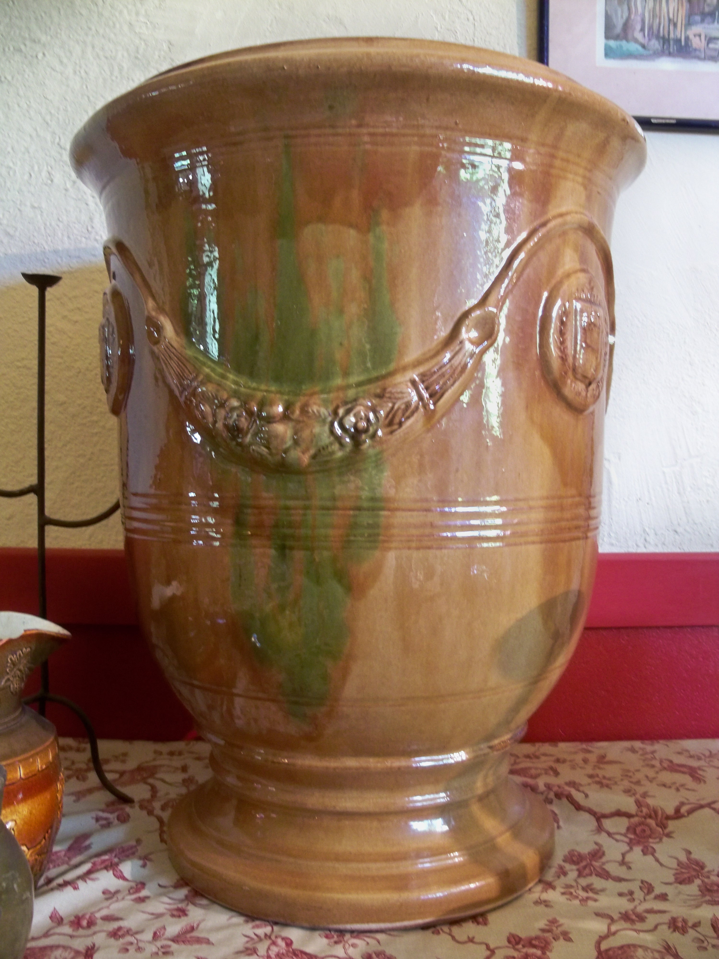 vase d'Anduse Resto de la gare de Bonnieux